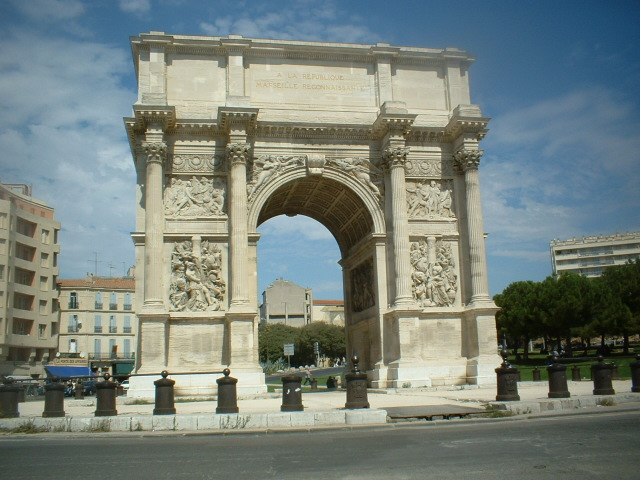 Porte d'Aix (Marseille)